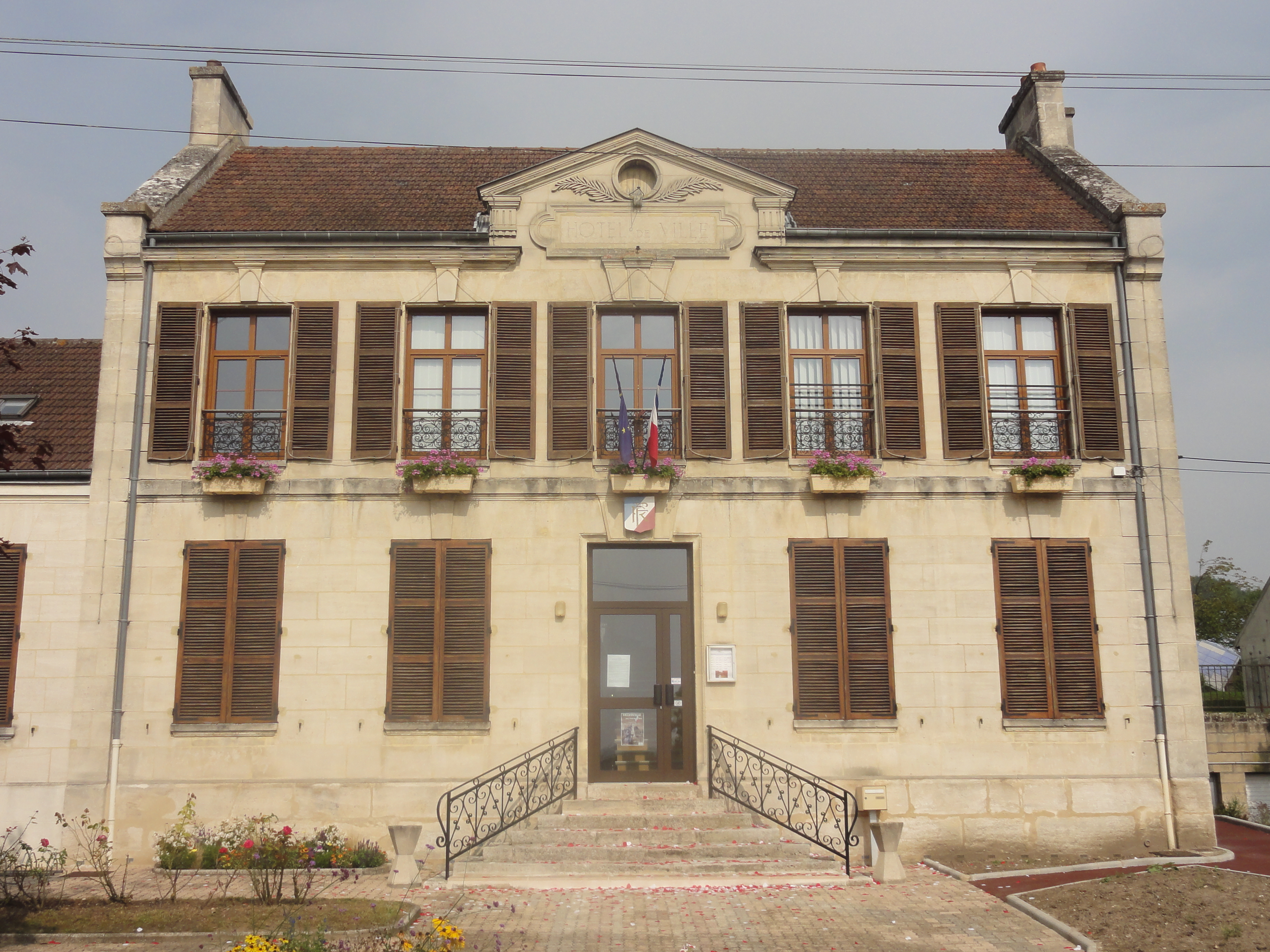 La mairie, rue Robert-Guerlin.